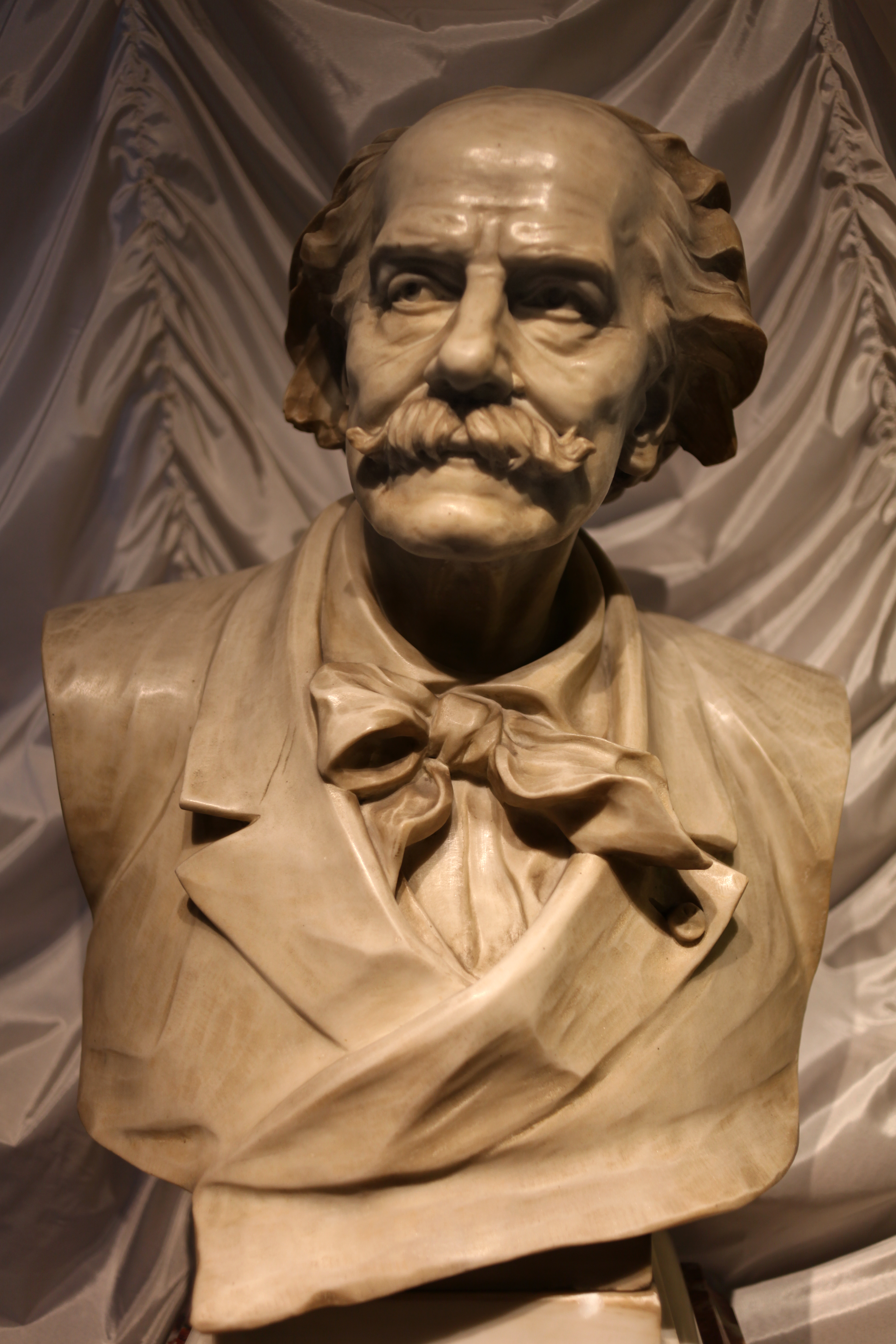 Gottardo Freschetti (1906-1979) Ritatto di Jules Massenet, al Museo del Teatro alla Scala di Milano